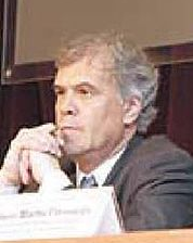 Lerner